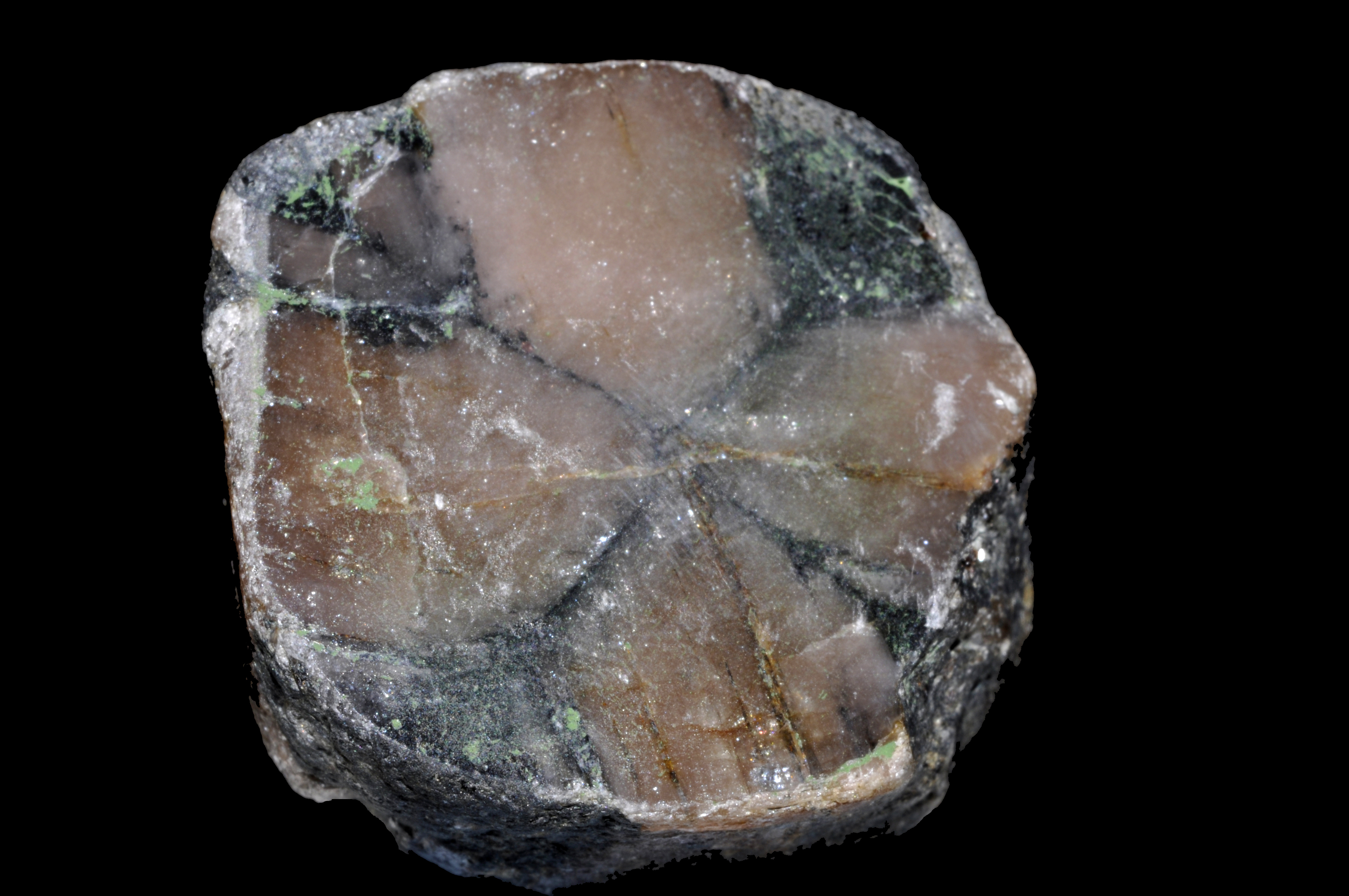 Chiastolite